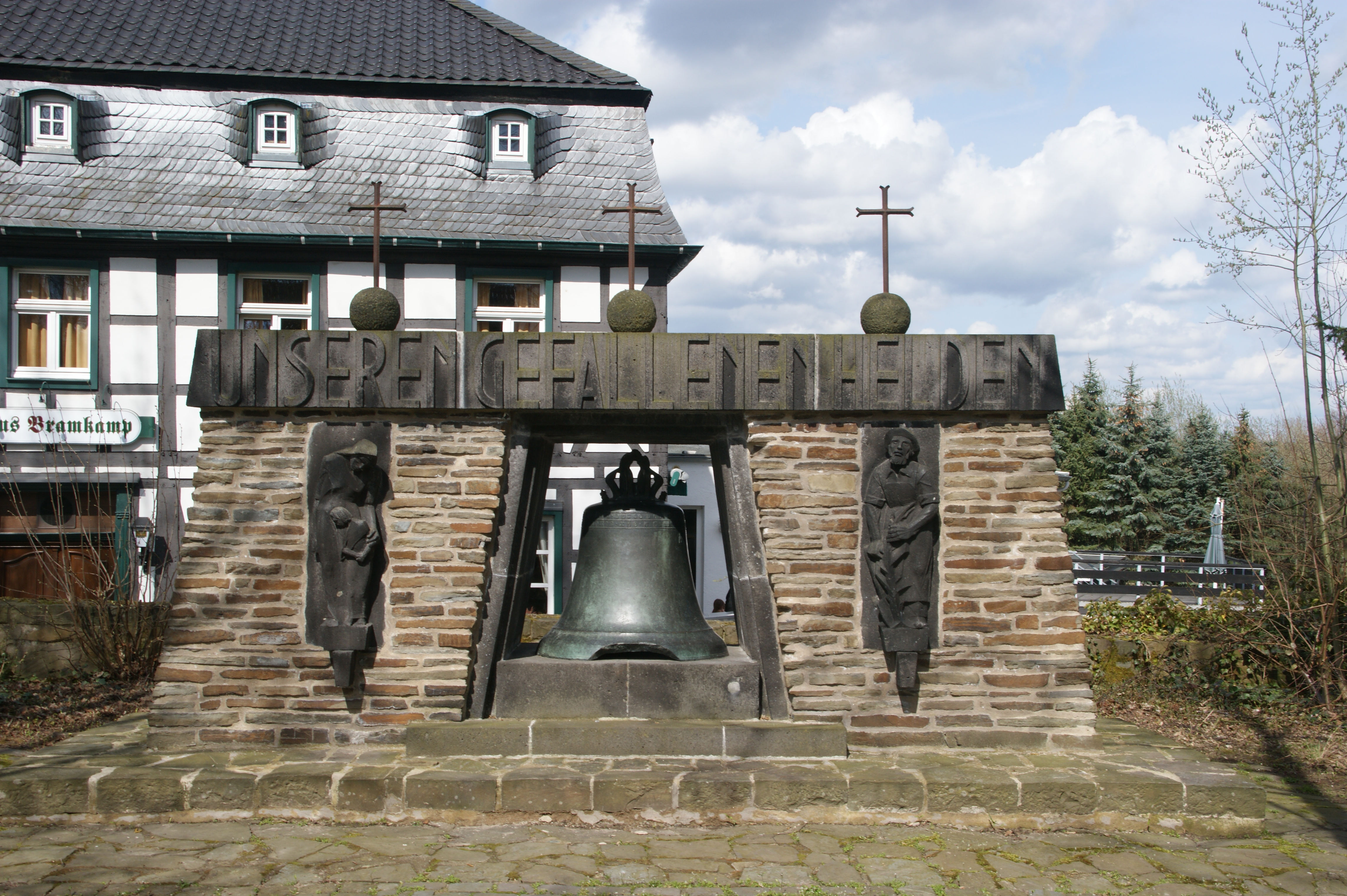 Denkmal auf dem Kirchenvorplatz in Königswinter-Oberpleis